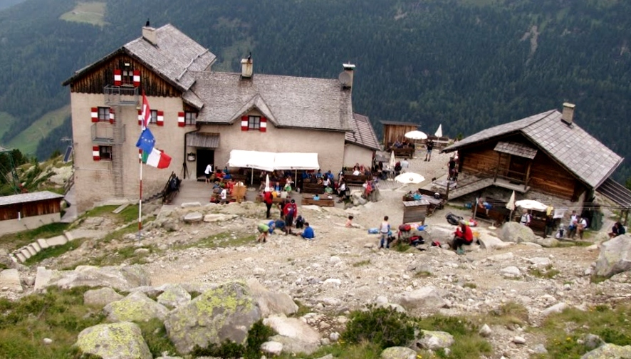 Rifugio Roma 2012